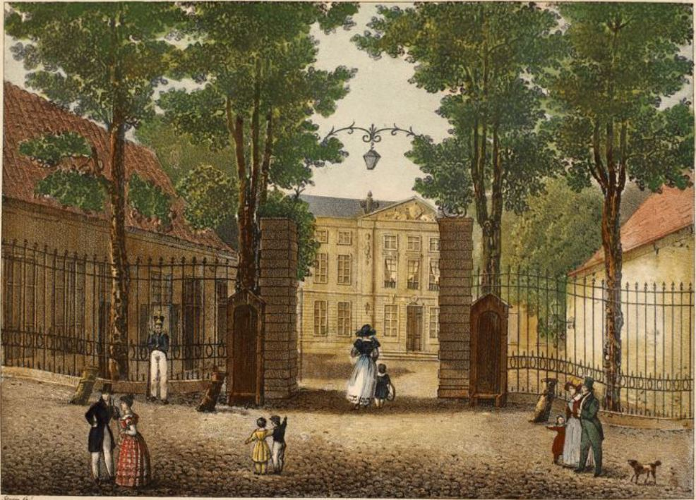 Het Hof. Hôtel du Gouvernement à Bois-le-Duc